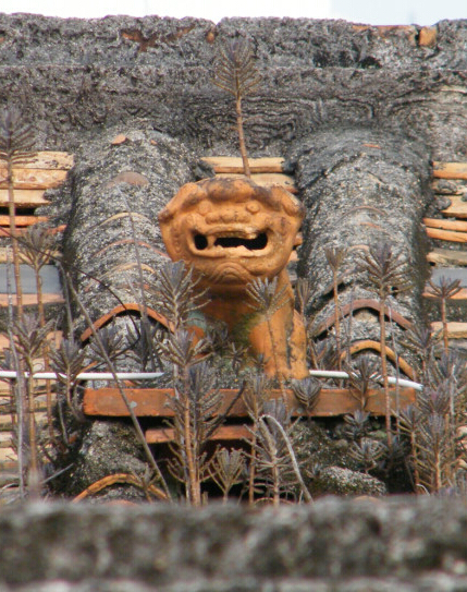 中文（中国大陆）: 广东省汕头市达濠老厝厝顶的风狮